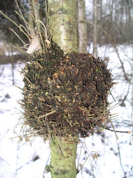 Galas